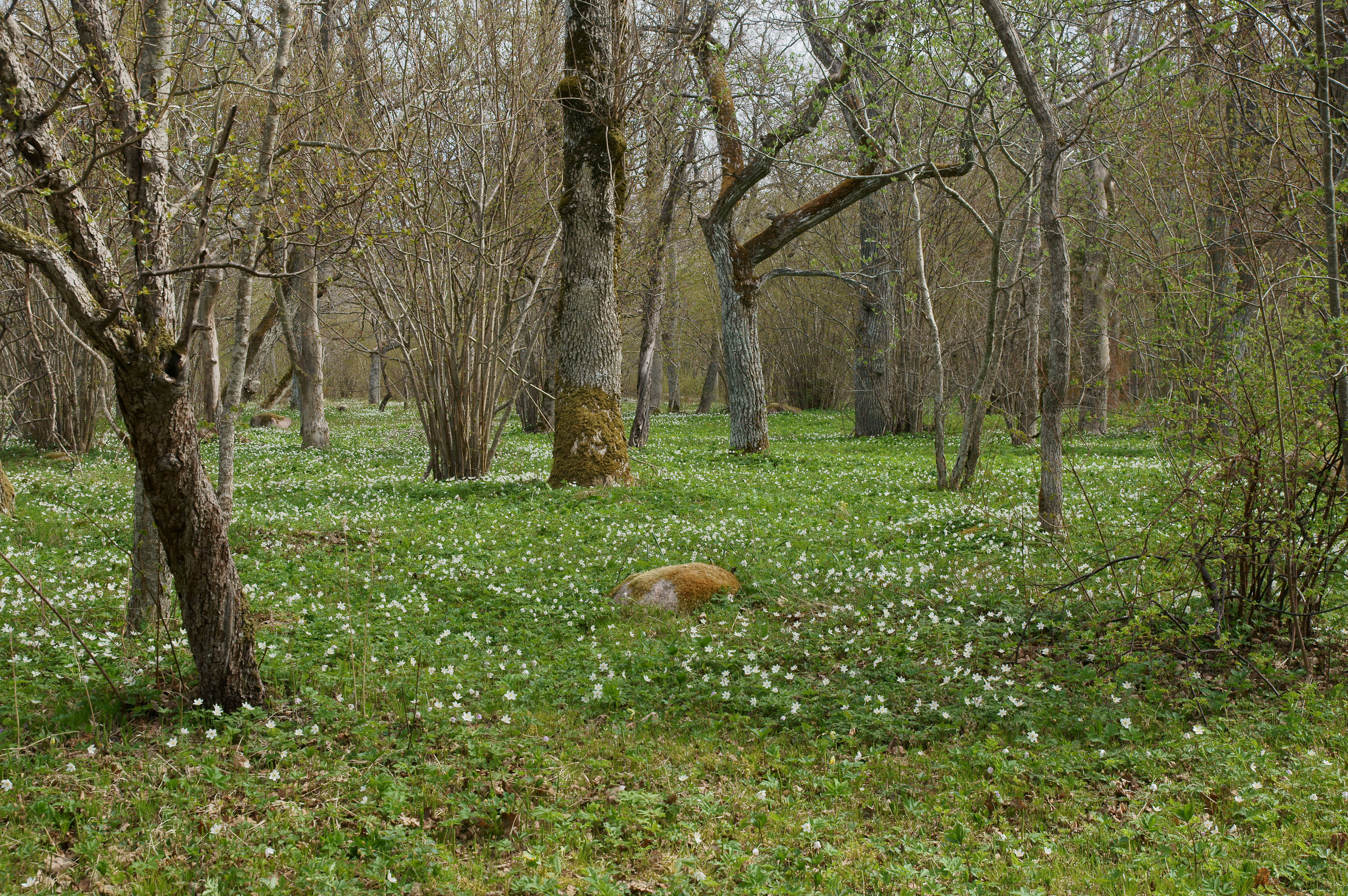 Saaremaal, Loode tammiku puisniit, kevadel